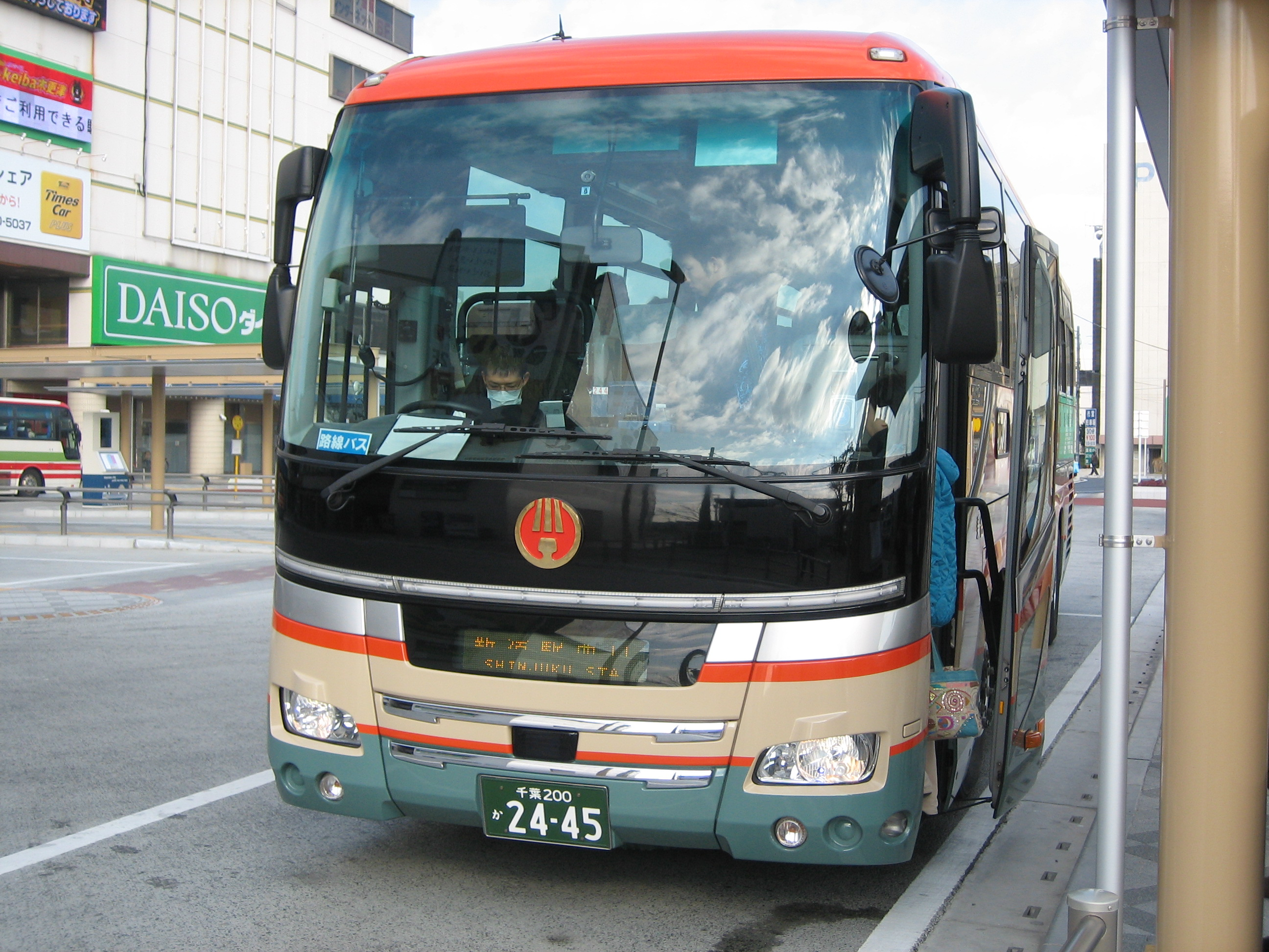 木更津駅西口で発車を待つ新宿駅西口行のバス